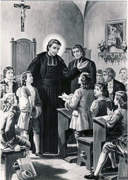 Louis de Monfort, le fondateur des frères St-Gabriel, accompagné d'un des premiers frères qu'il a formé.